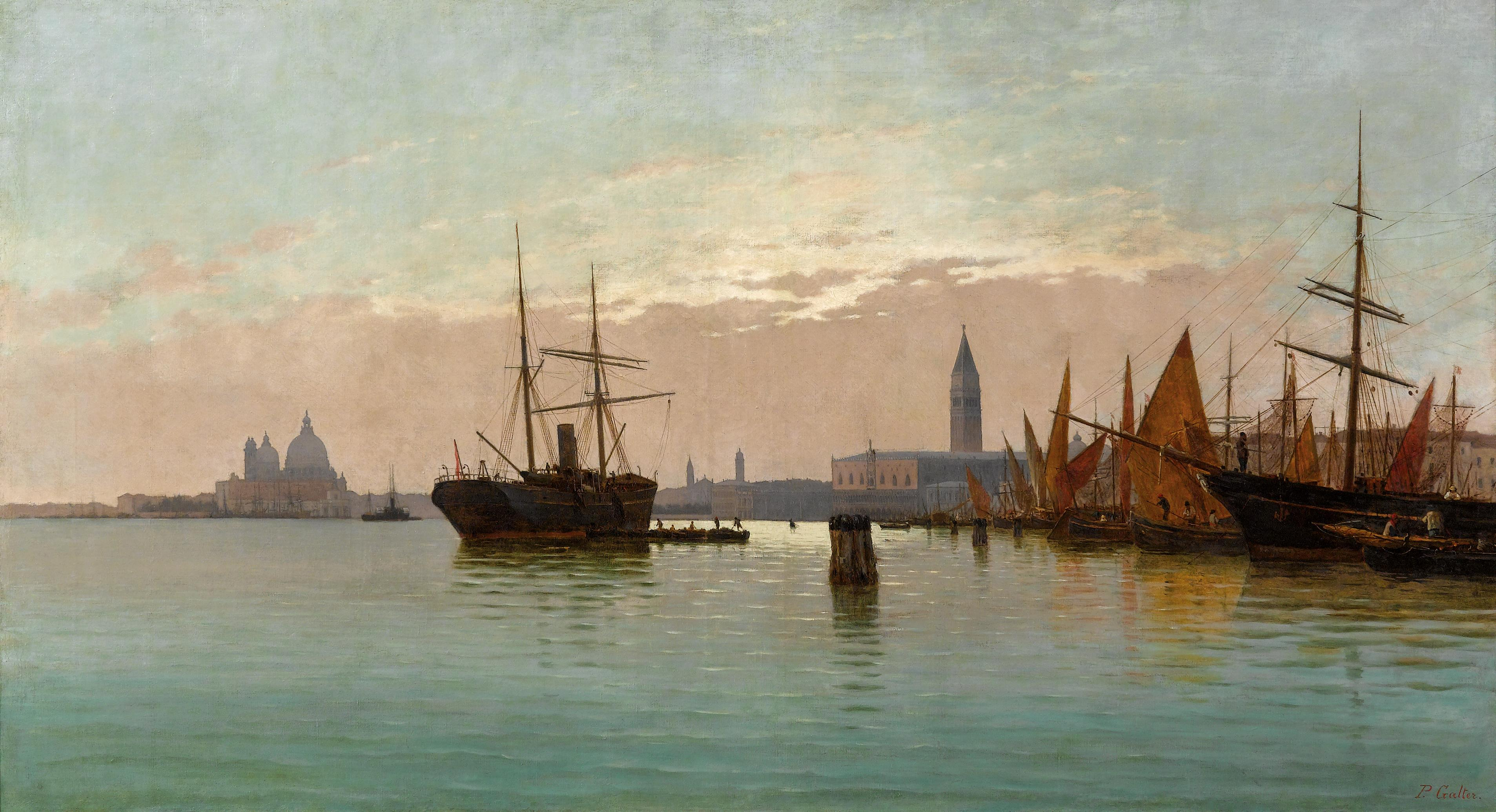 links die Punta della Dogana mit Santa Maria della Salute und rechts die Piazza San Marco